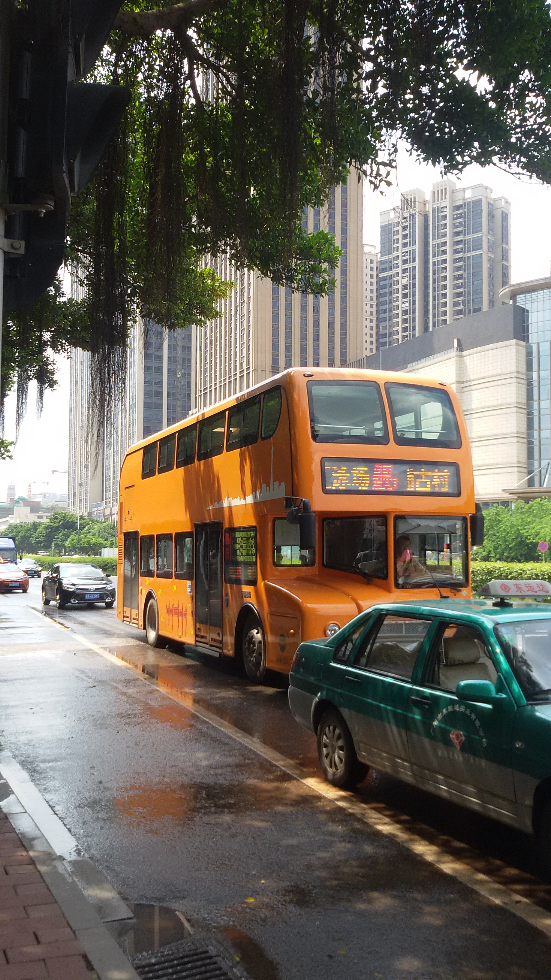 粵語: 廣州地區嘅雙層巴士（英式品種）